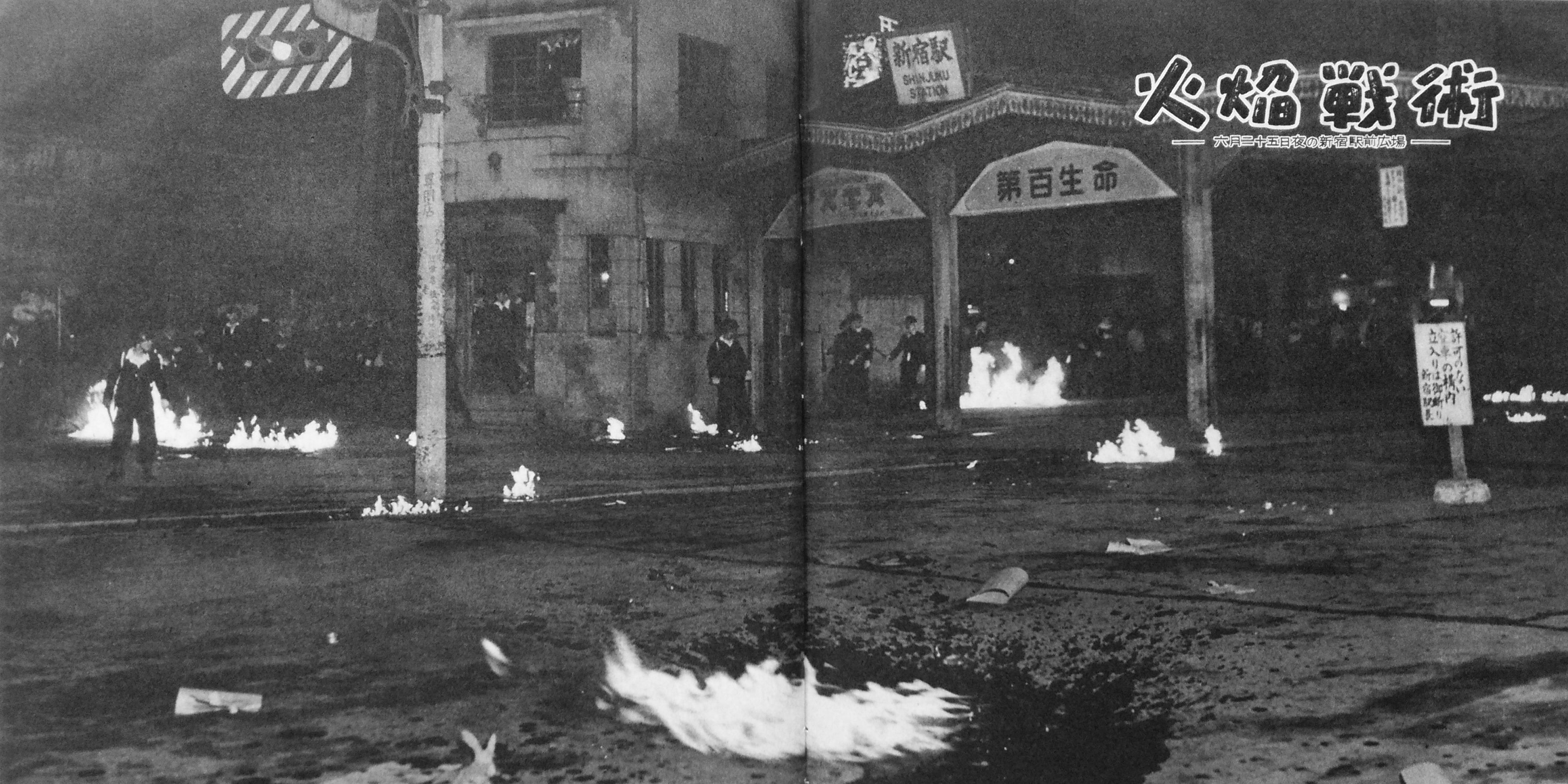 1952年6月25日の新宿駅前広場